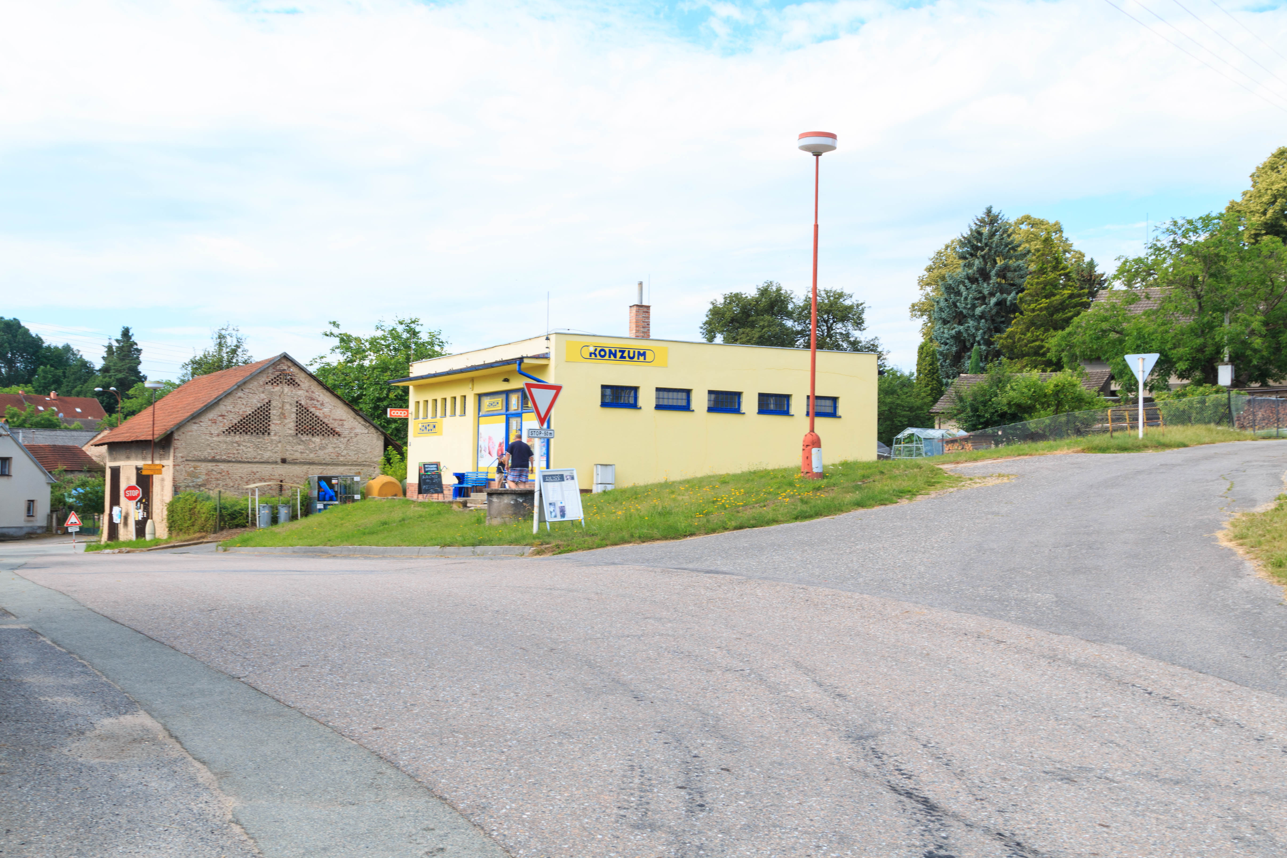 Újezd u Chocně prodejna